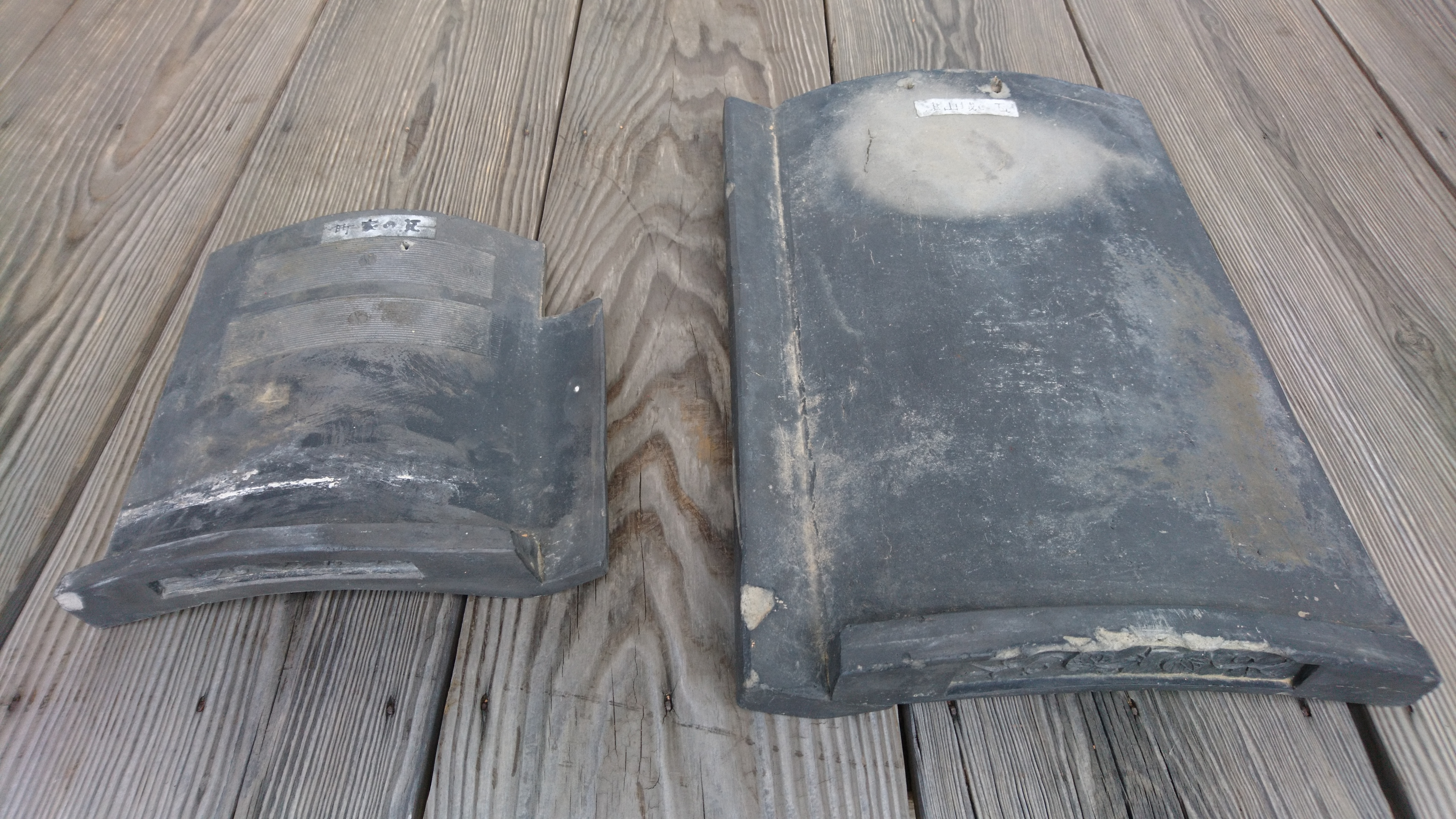 箕作阮甫旧宅にある約140年前の瓦